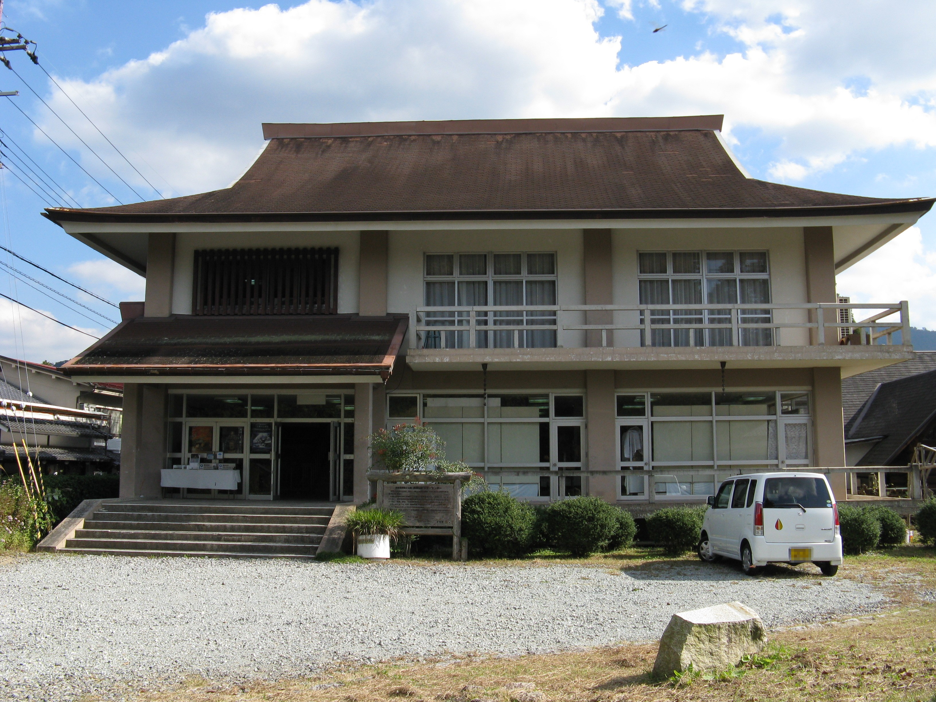 吉野山ビジターセンター